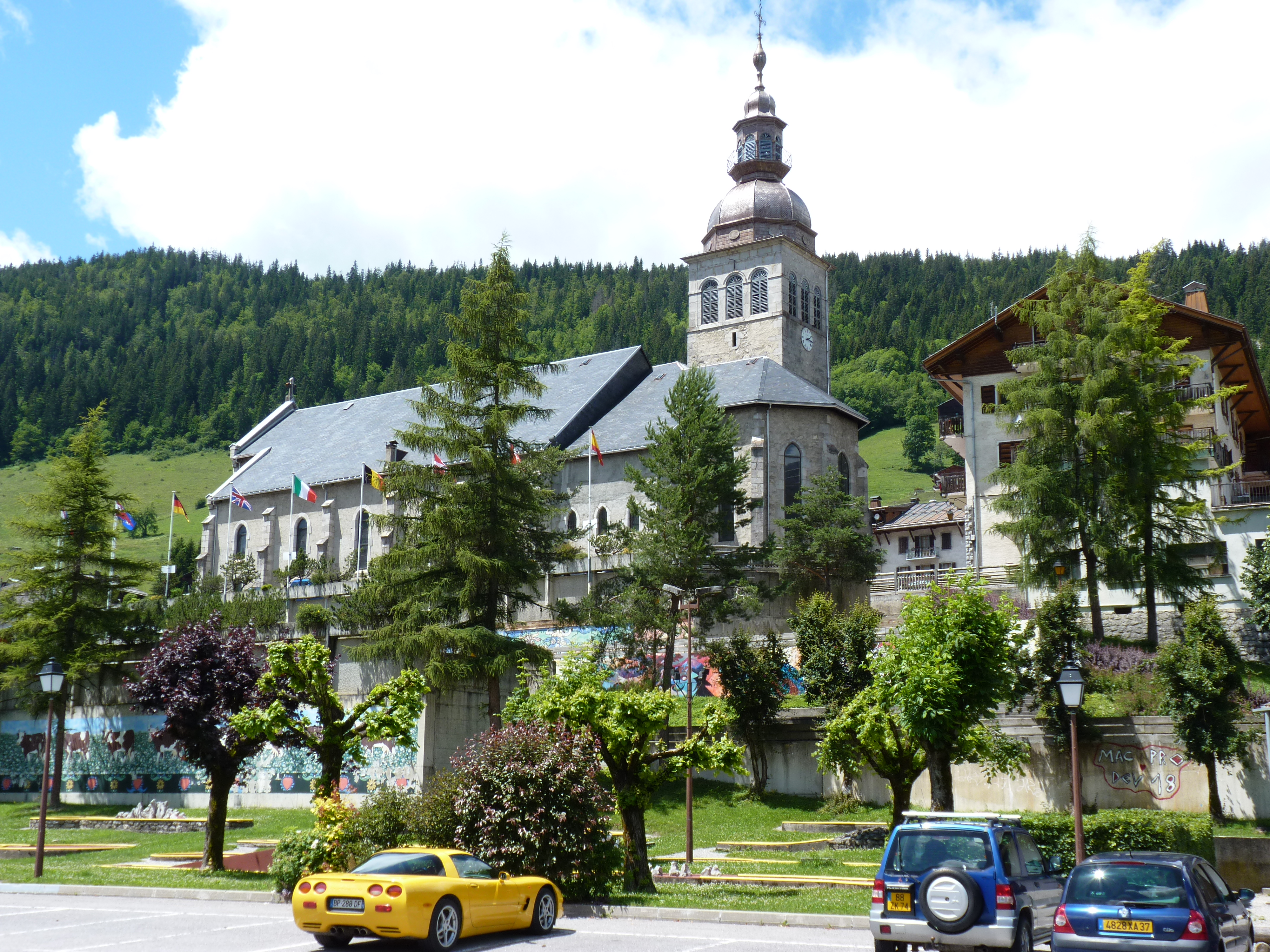 Eglise du Grand-Bornand en Haute-Savoie